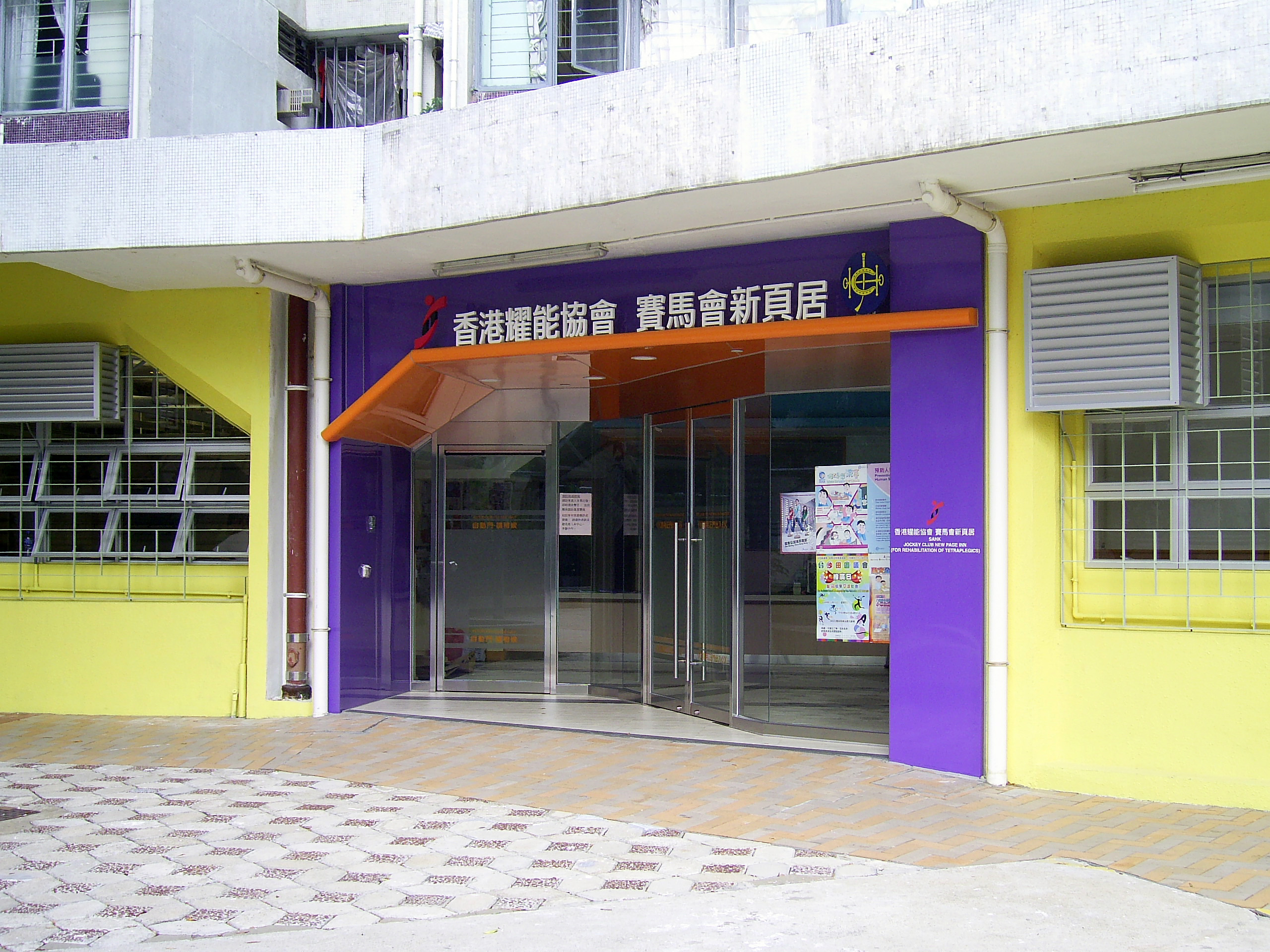 中文（香港）: 香港耀能協會賽馬會新頁居